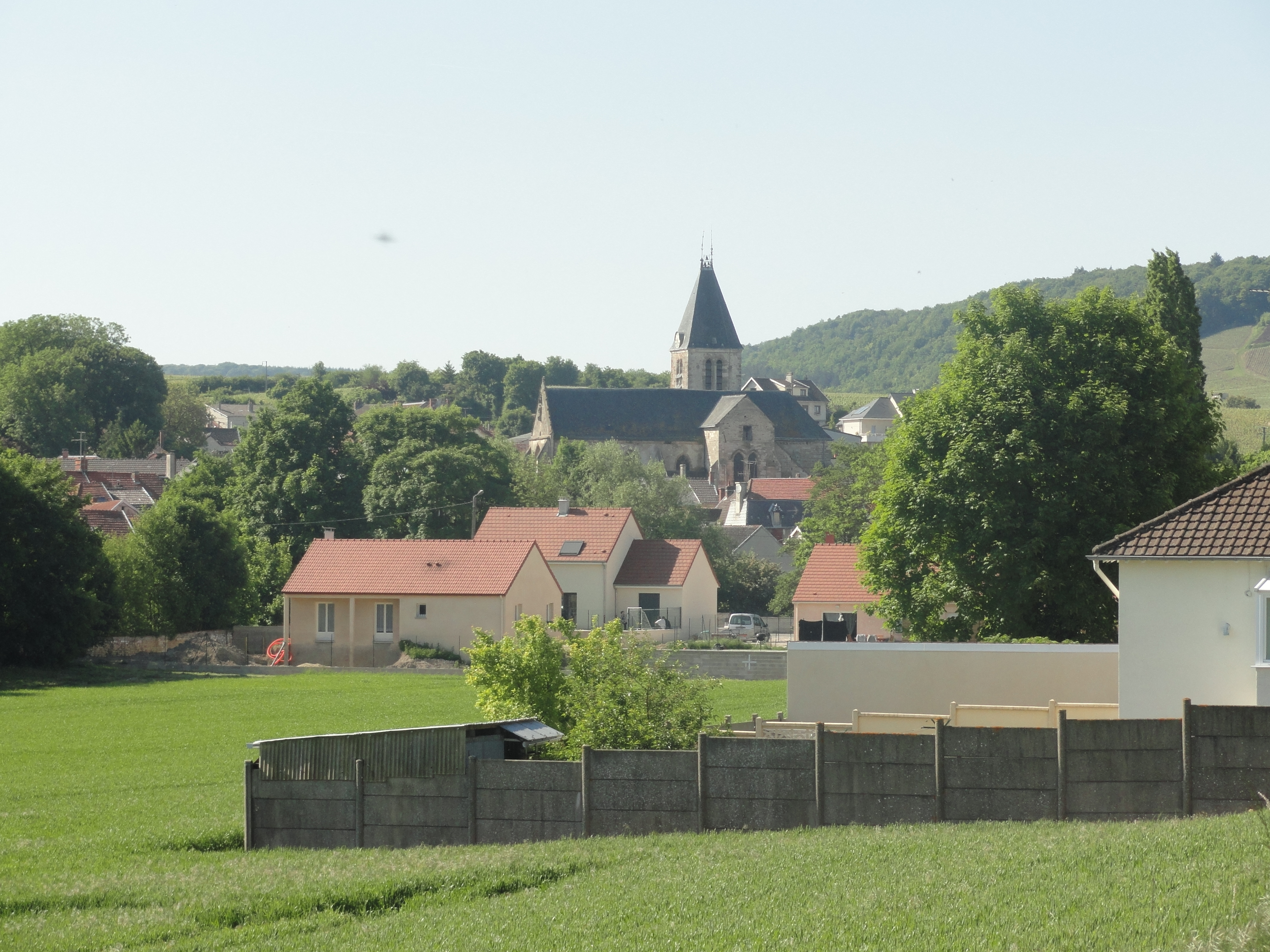 Vue du centre du village d'Avenay-Val-d'Or (Marne, France) et de son église.